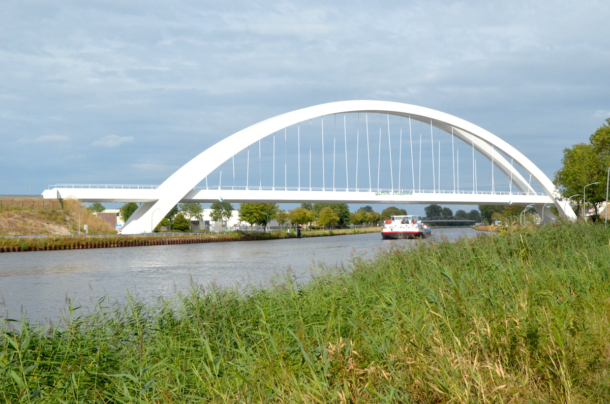 De Spoorbrug te Zuidhorn over het Van Starkenborghkanaal. Foto: Erik Swierstra.